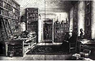 Alexander von Humboldt in seiner Bibliothek andere Versionen: Aquarell von Eduard Hildebrand